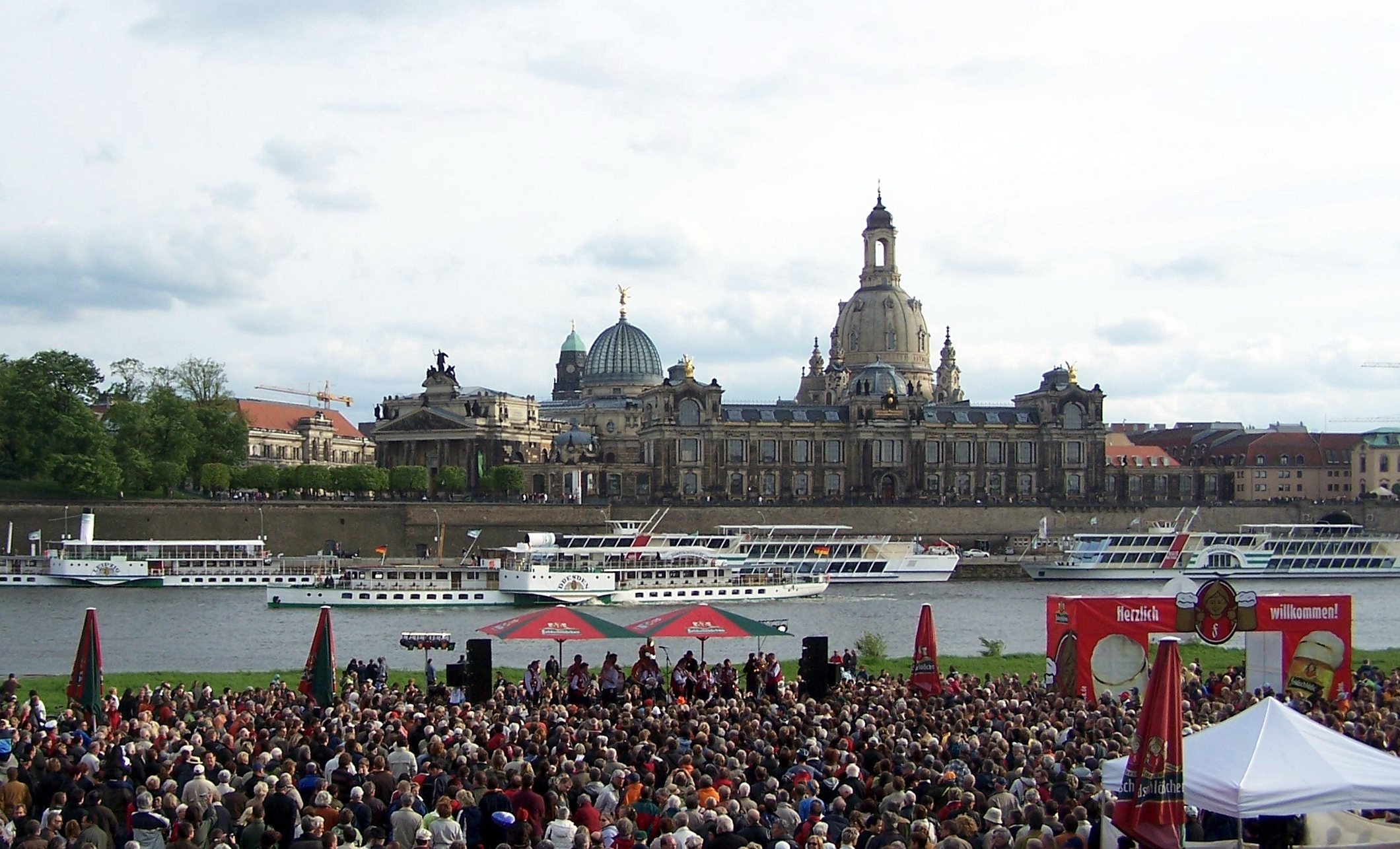 Abschluss-Session des Internationalen Dixielandfestivals Dresden 2010